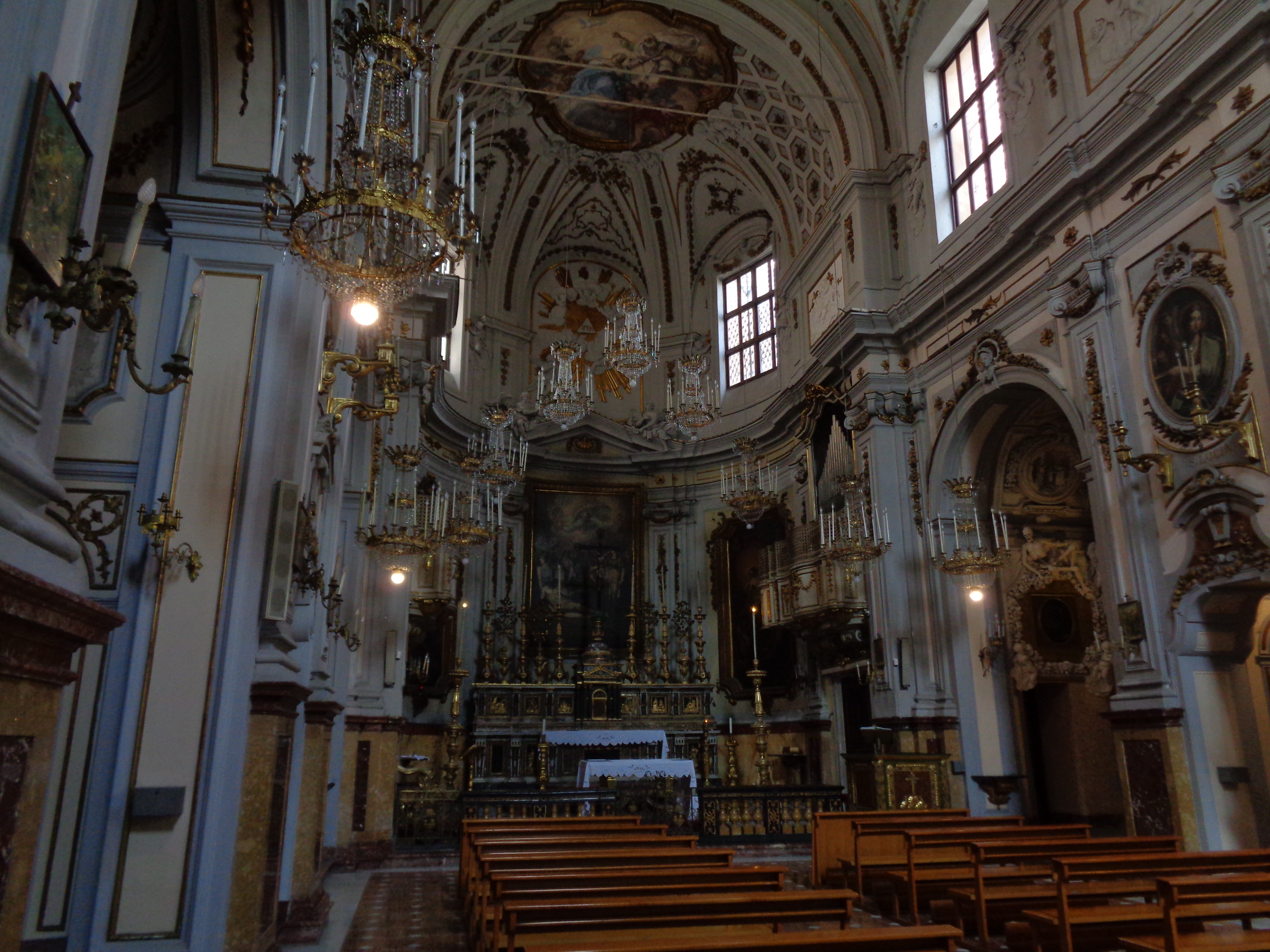 Innenraum der Kirche Sant'orsola, Palermo